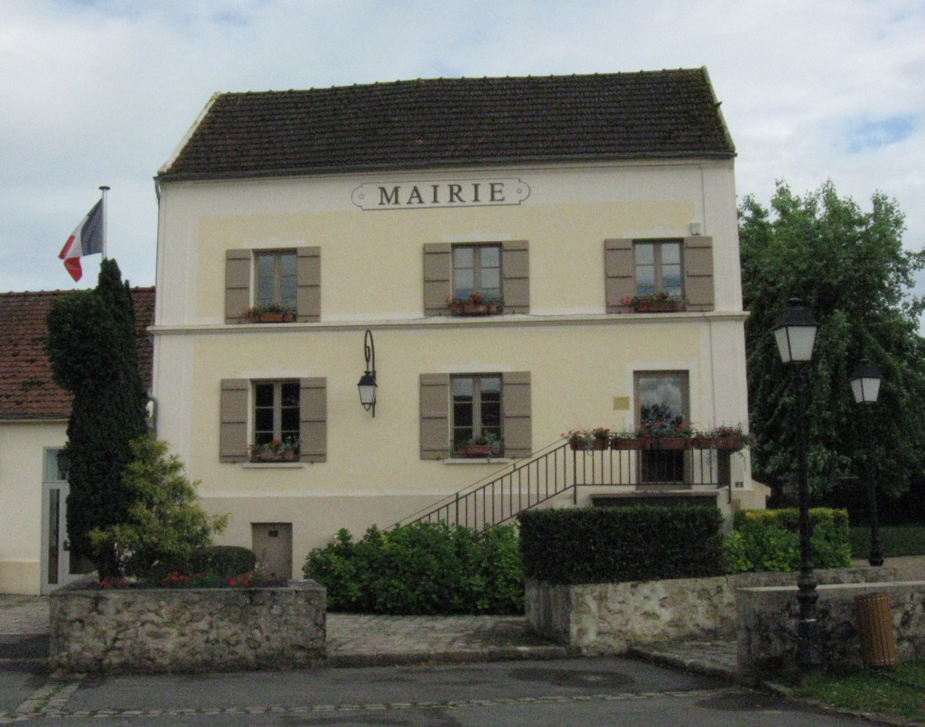 Mairie de Coulombs-en-Valois. (département de la Seine-et-Marne, région Île-de-France).